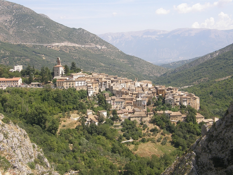 Anversa degli Abruzzi 2009